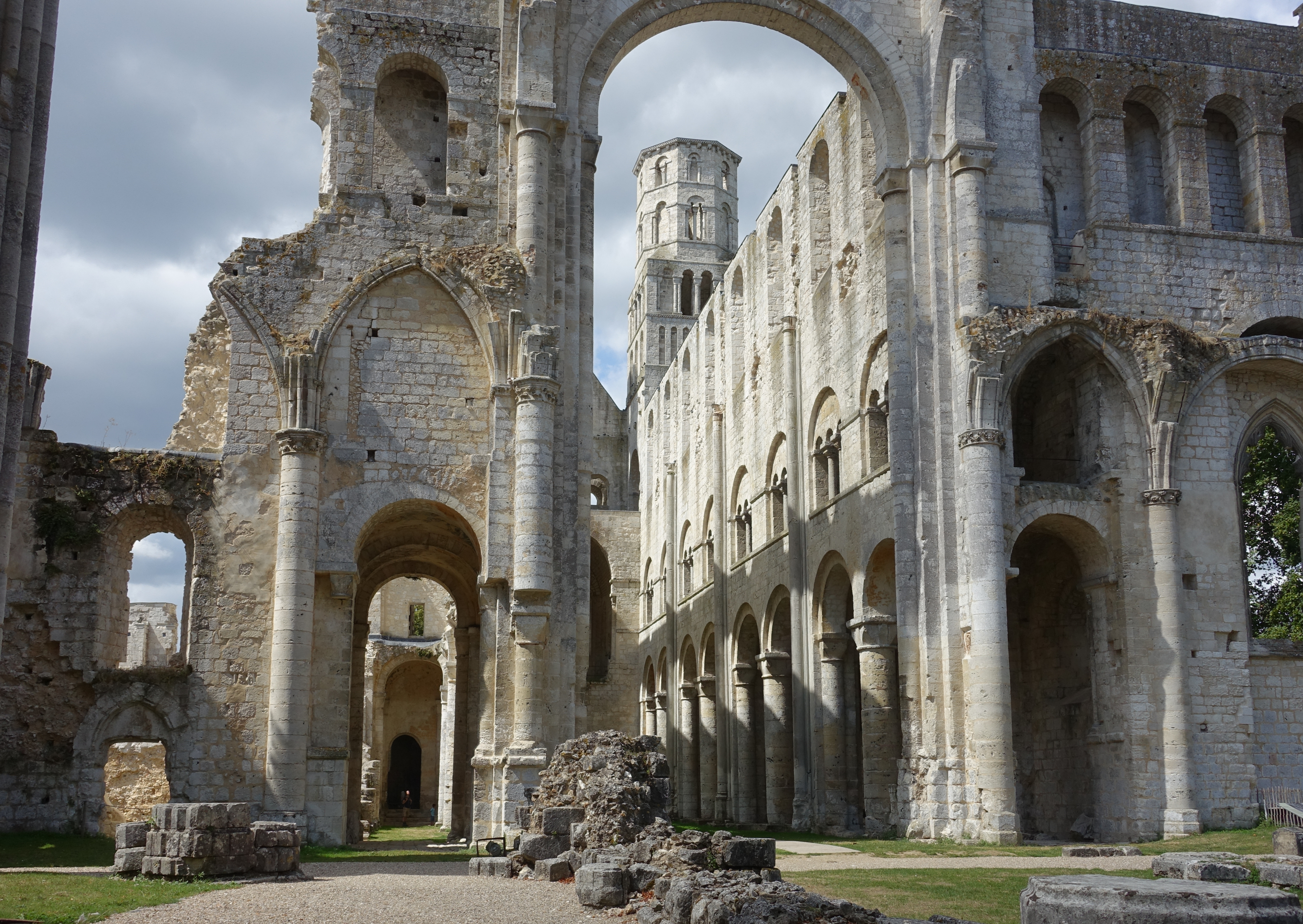 Abdij van Jumieges, de ruïne van de kerk. Een van de twee torens aan de voorzijde is te zien onder de boog.